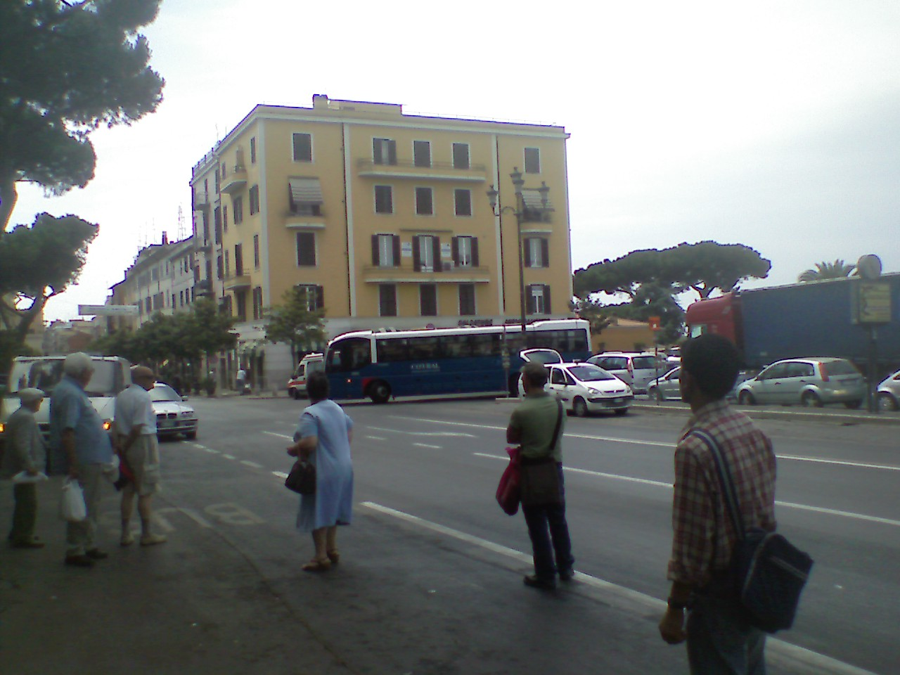 Piazza Mazzini ad Albano Laziale con bus COTRAL EuroClass 389